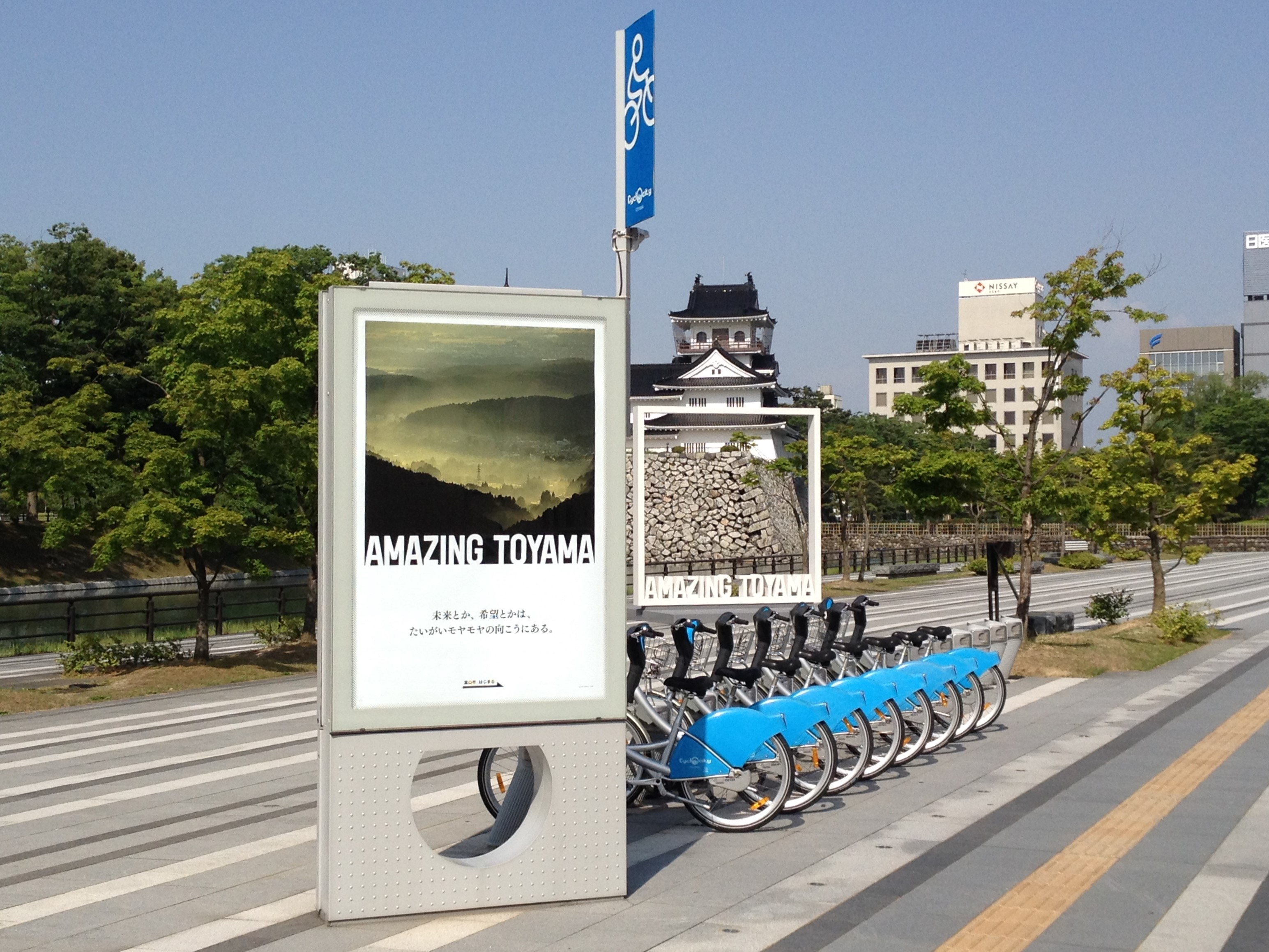 富山市のコミュニティサイクル「アヴィレ」丸の内ステーションの画像